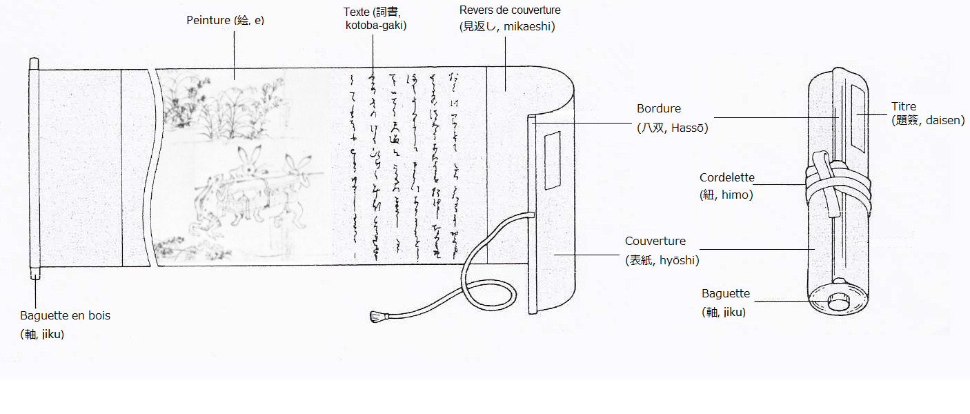 Schéma général d'un emaki (rouleaux narratifs peints au Japon), enroulé et déroulé. Source : Masanori Aoyagi, 日本美術館 (Nihon bijutsukan, lit. musée d'art japonais), Shōgakkan, 1997, page 560.